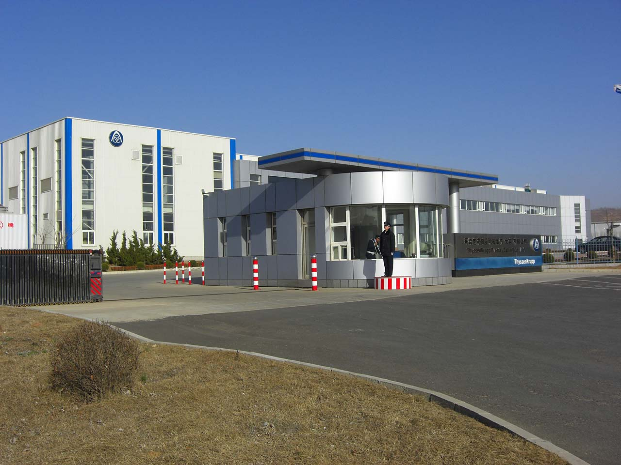 ThyssenKrupp Presta Dalian